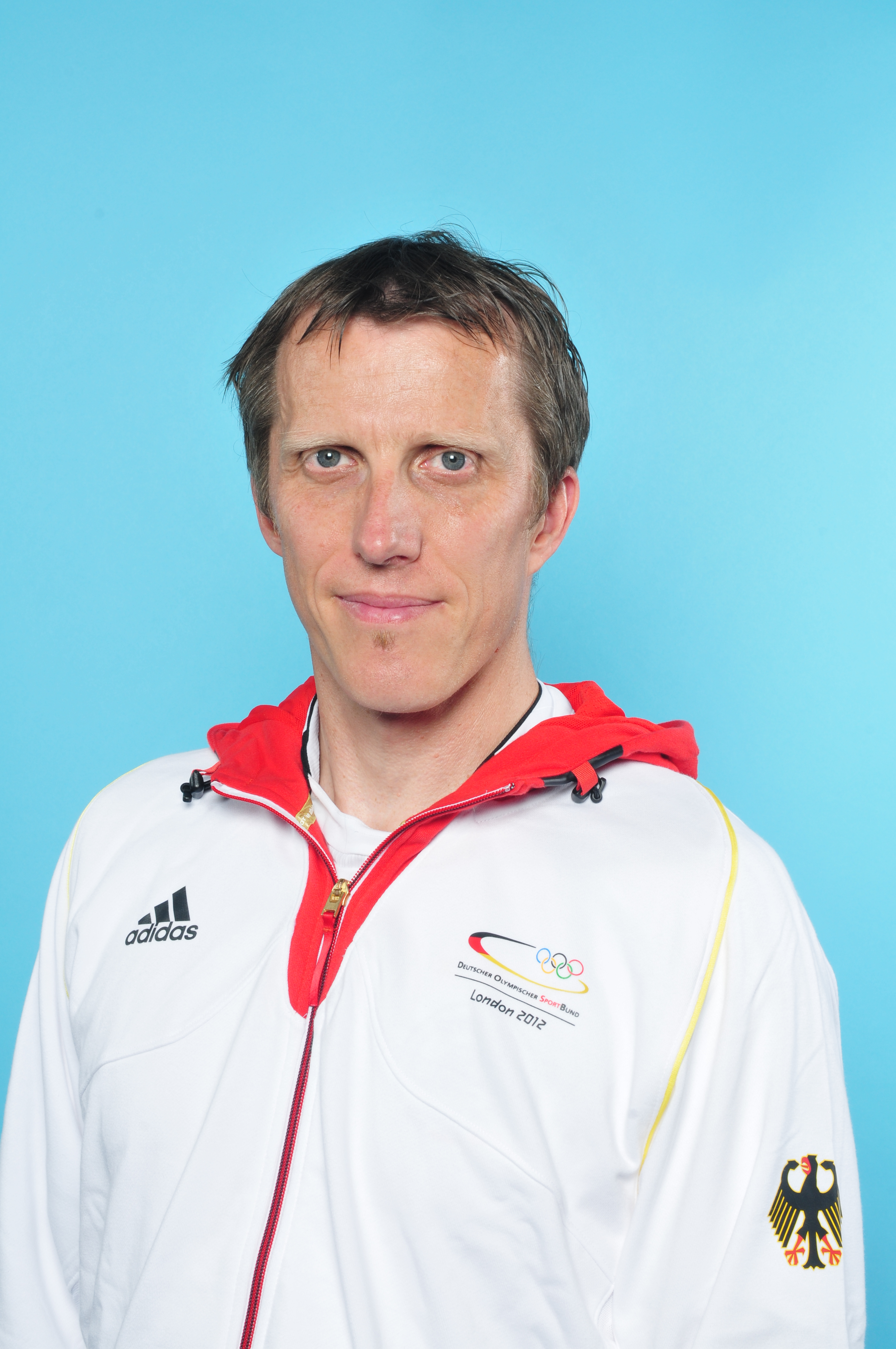 Einkleidung der deutschen Olympiamannschaftam 28. Juni 2012 in Mainz - Olympische Sommerspiele 2012 Cirdan Marcus Cyron Olaf Kosinsky Ralf Roletschek Sven Teschke